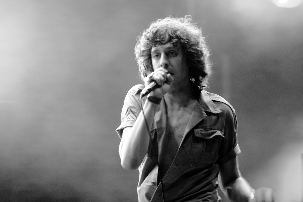 Donauinselfest 2010 FM4 Stage, Vienna